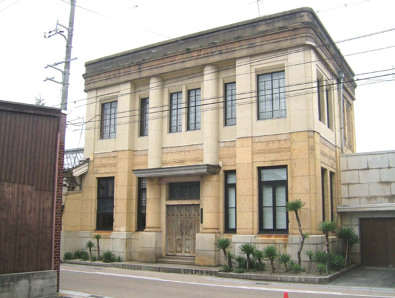 坂口ビル、鳥取県米子市尾高町